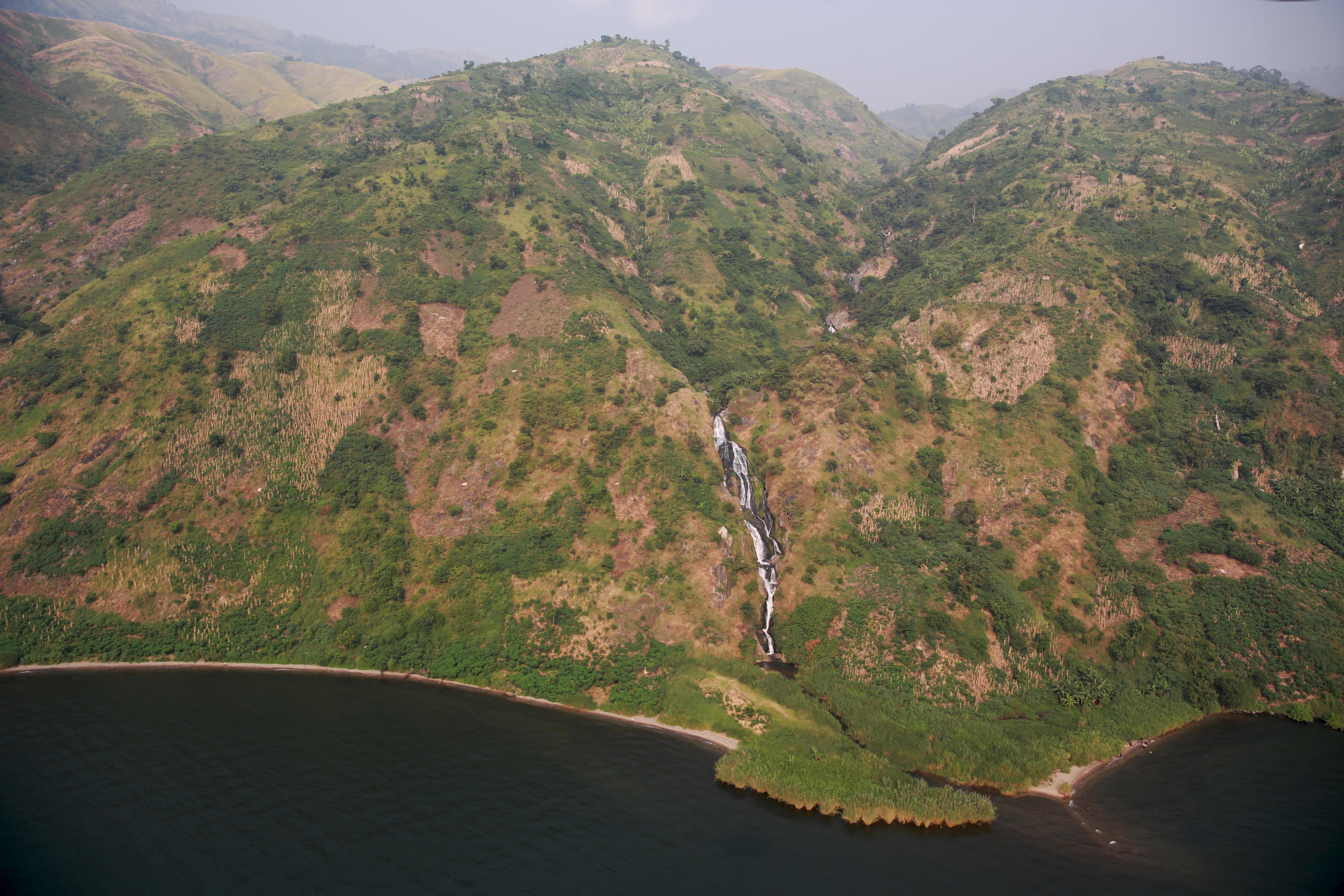 LEGENDE : Parc National des Virunga, Nord-Kivu, RD Congo, 09 janvier 2015 : Vue partielle d’une chaîne de montagnes, avec un cours d’eau qui dévale la vallée en cascades avant de se jeter dans le lac Edouard. Photo MONUSCO/Abel Kavanagh CAPTION: Virunga National Park, North Kivu, DR Congo, 09 January 2015 : Partial view of a mountain range with a stream cascading down the valley before emptying into Lake Edward. Photo MONUSCO/Abel Kavanagh